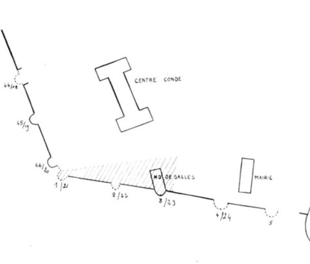 Partie du plan représentant le rempart gallo-romain de Bourges, par M. Steiner, en 1813.